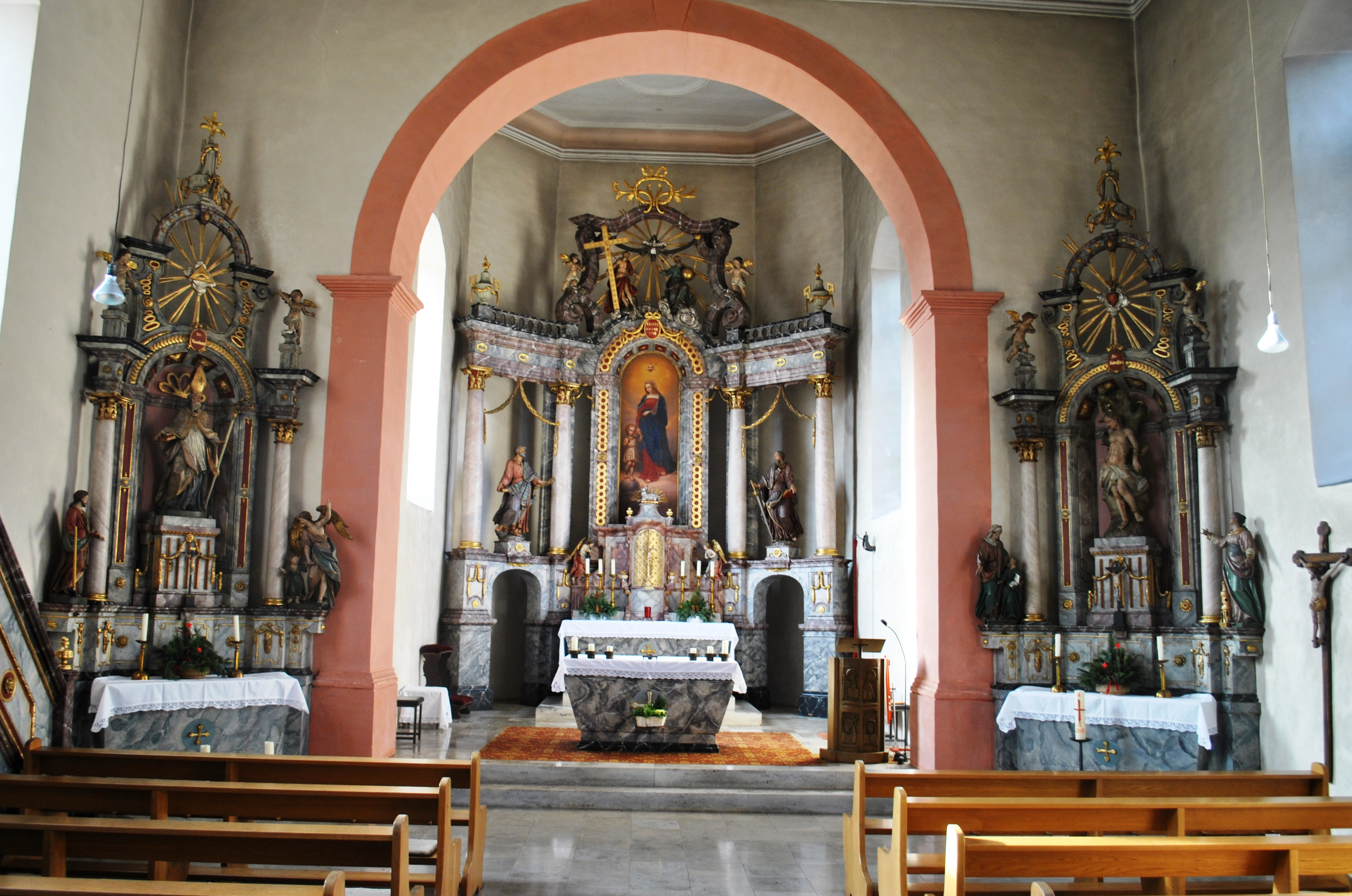 Katholische Pfarrkirche St. Nikolaus Saalbau mit polygonalem Chorabschluss und Glockenturm, nach einem Entwurf von Major Adam Salomon Fischer, erbaut 1784–1790; mit Ausstattung